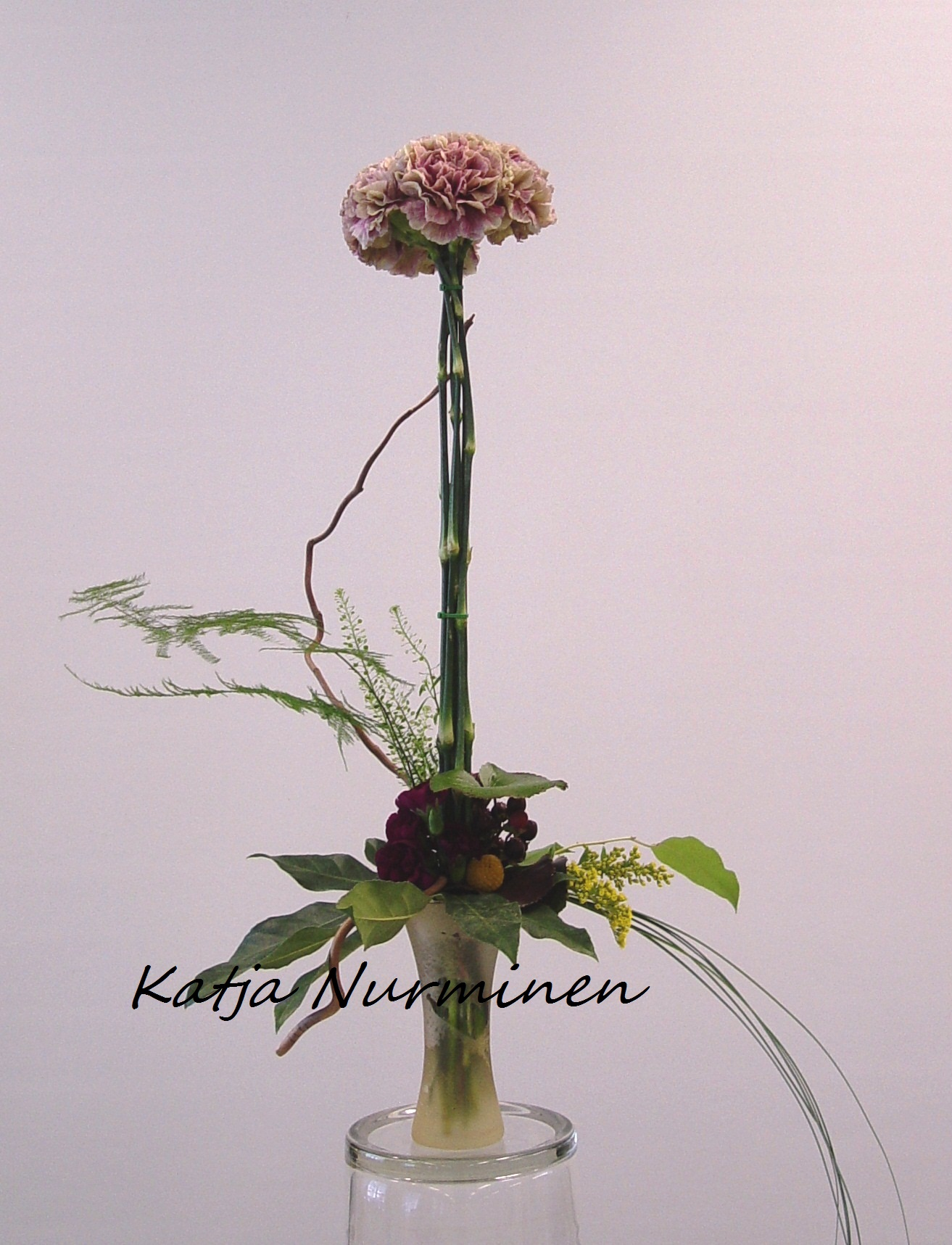 Kimppu - formal-lineaarinen tyylisuunta